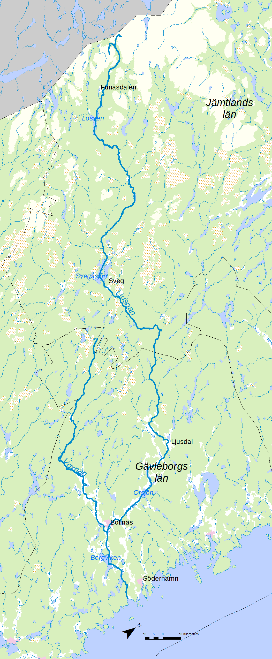 Karta över Ljusnans lopp från norska gränsen till Bottenviken.